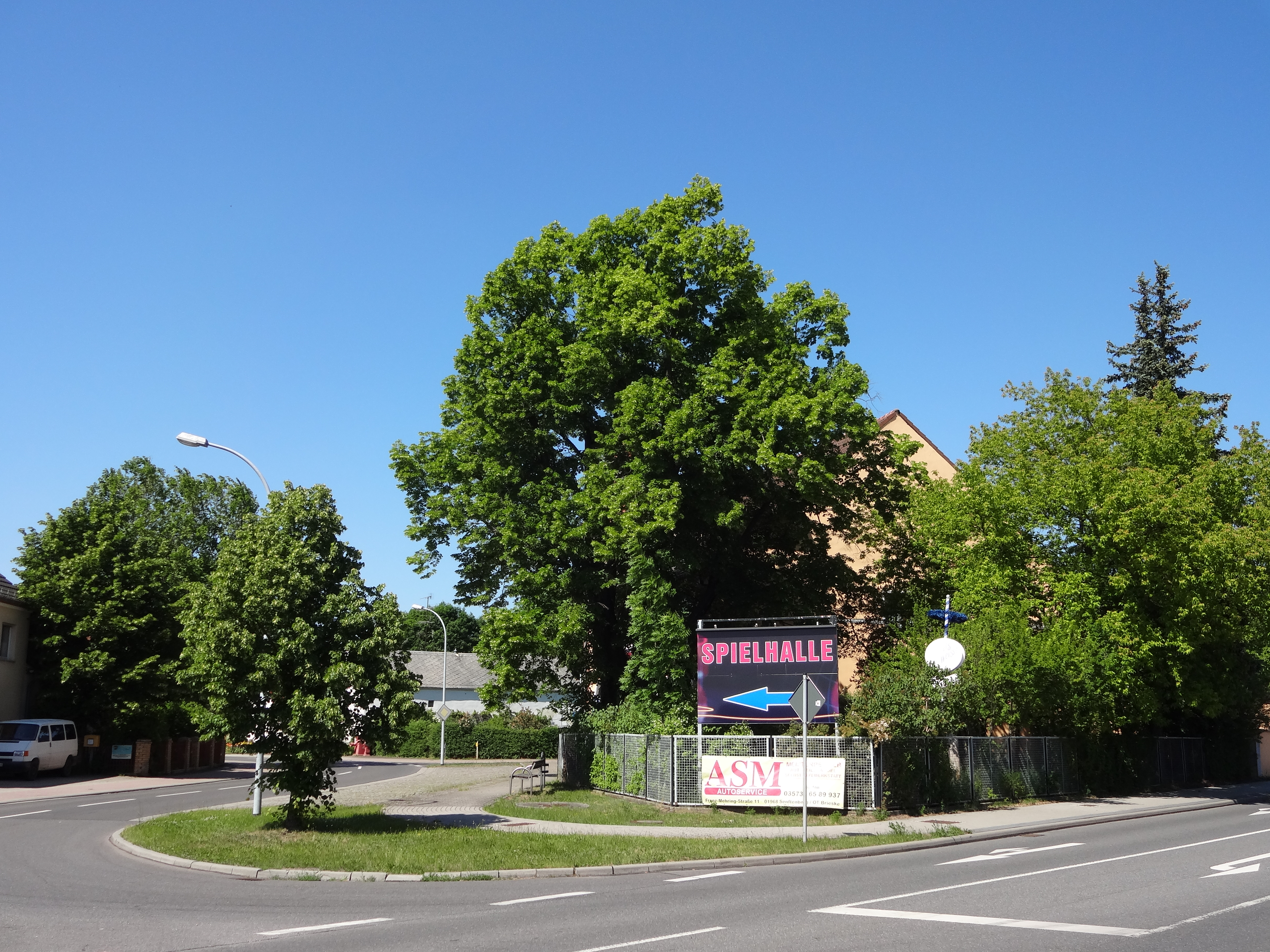 als Naturdenkmal geschützte Winterlinde in der Senftenberger Straße in Schwarzeheide